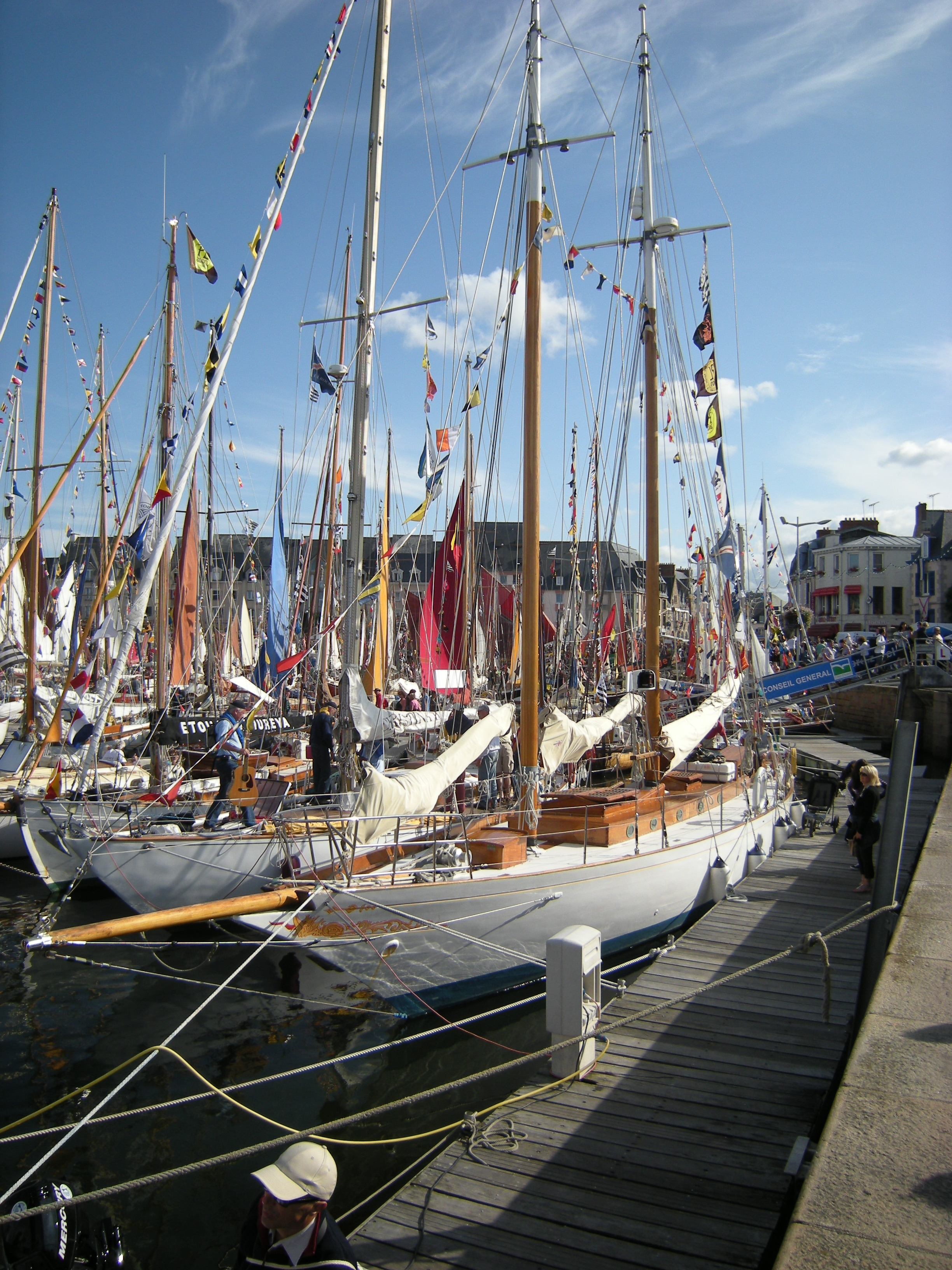 Elise, design William Fife III de 1912, au Festival du chant de marin. Paimpol 2009